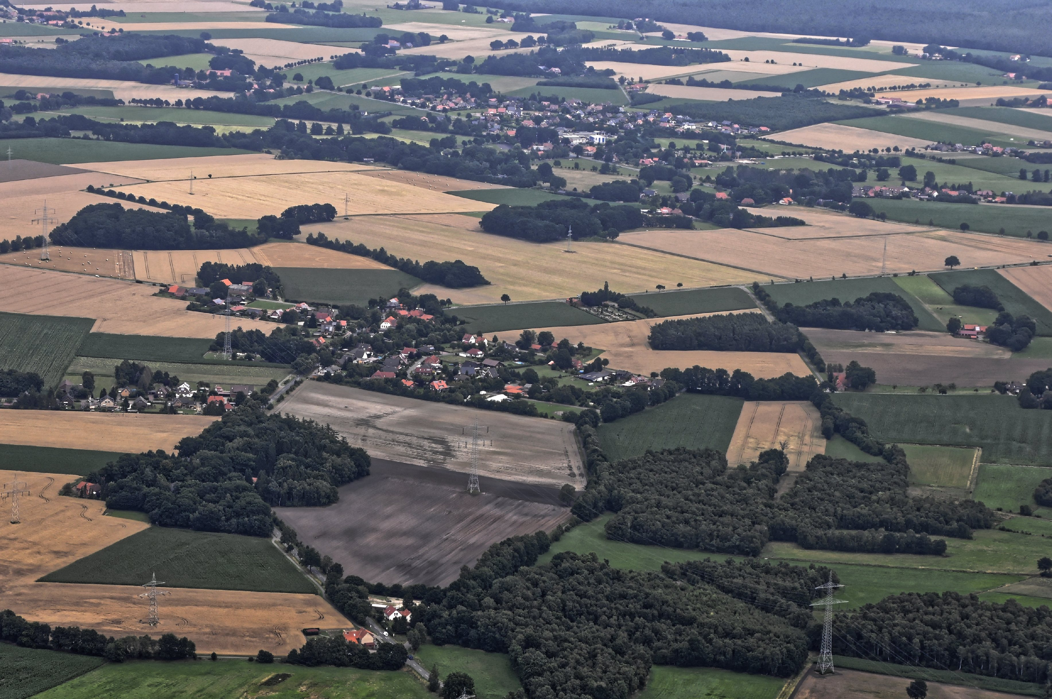 Bilder vom Flug Nordholz-Hammelburg 2015: Blick von Südwesten auf Hesterberg (am linken Bildrand), Mainsche (Bildmitte) und Pennigsehl (hinten).